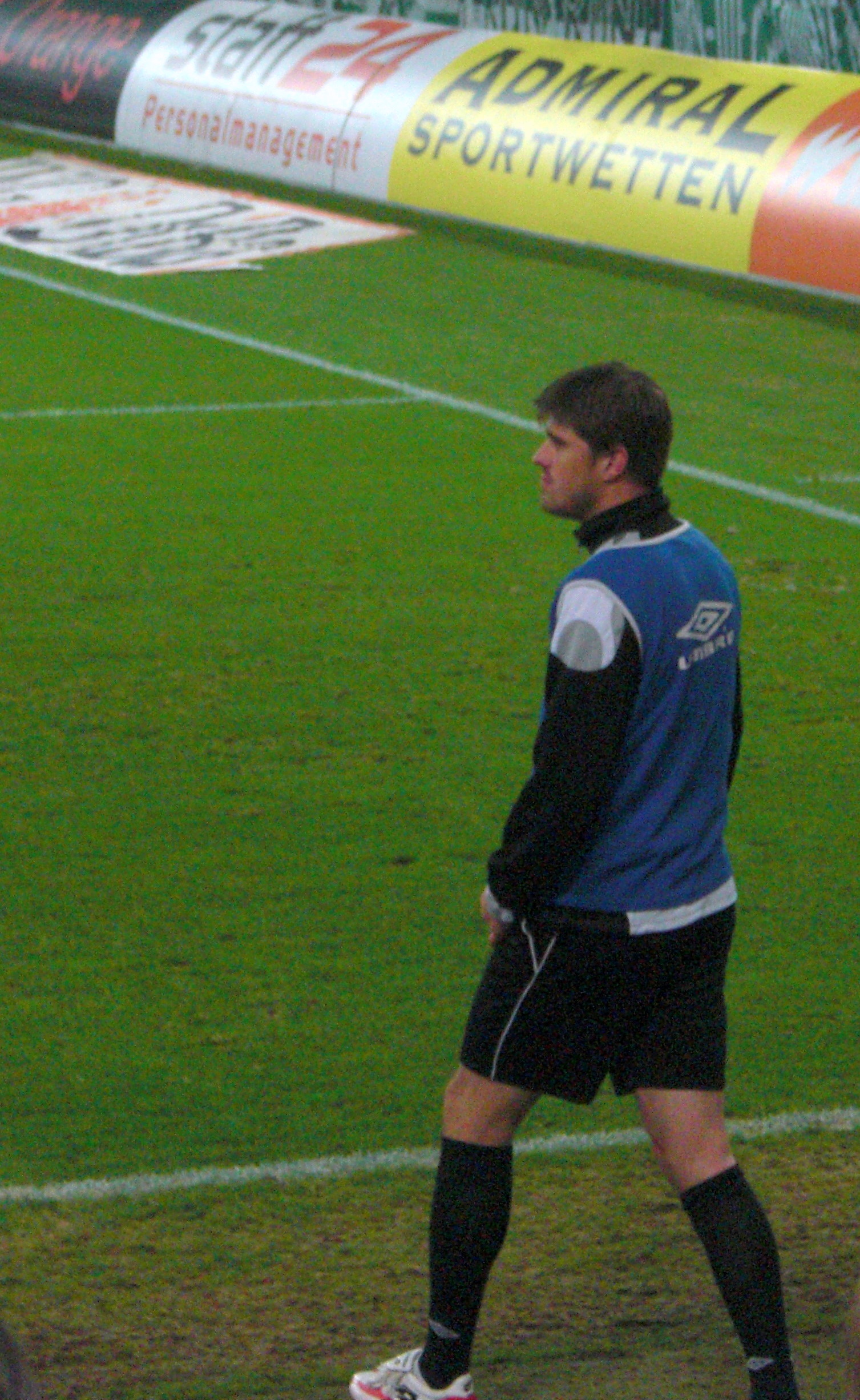 Mario Mijatovic beim Aufwärmen im Spiel SK Rapid Wien gegen den LASK.